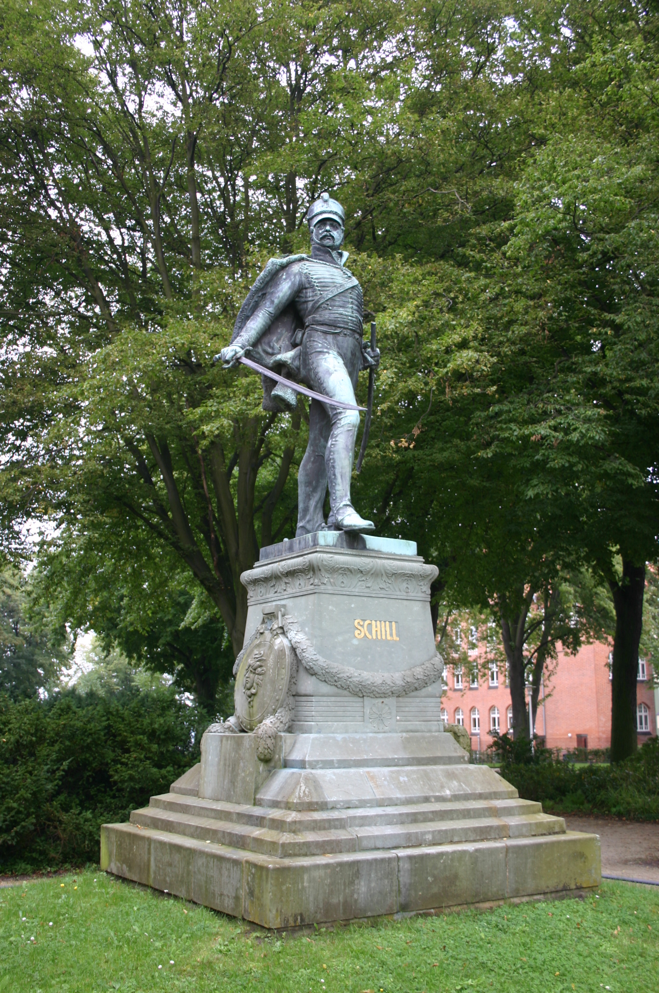 Schill Gedankstatue in Stralsund